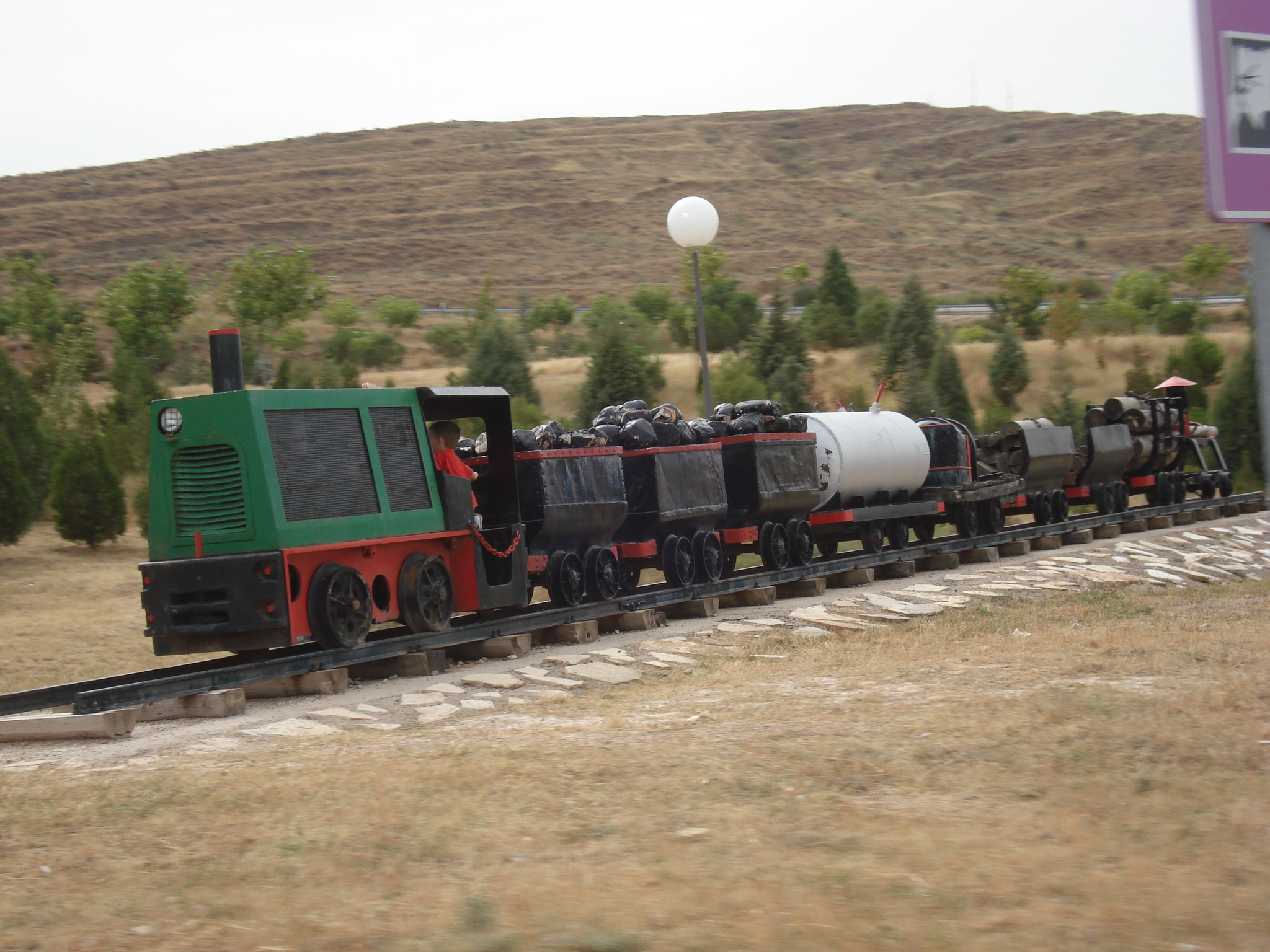 MUSEU DE LES MINES d' ESCUCHA